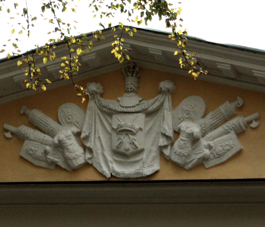 Герб рода Н.З. Хитрово на его собственном доме в Москве. Подколокольный переулок, 16.